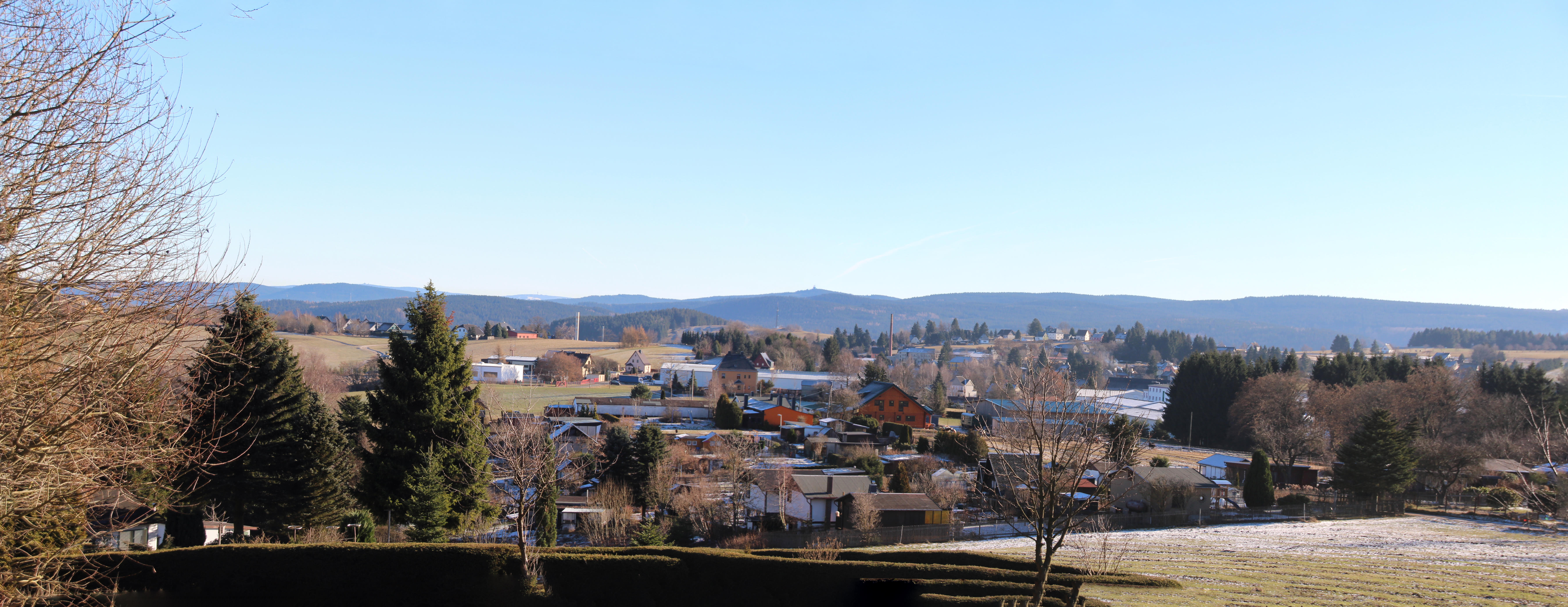 Schönheide im Erzgebirge Der Ortsteil Ascherwinkel liegt am weitesten westlich. Blick von Süd-Süd-West auf den Bereich Gartenweg. Im Hintergrund die südlich der Zwickauer Mulde liegende Bergkette, in der Mitte als höchste Erhebung der Auersberg (1018,2 m ü. NHN) mit der Radarstation, davor der in Schönheides Mitte liegende unbewaldete Berg Knock (725,5 m ü. NHN) mit einem Mobilfunkmast.